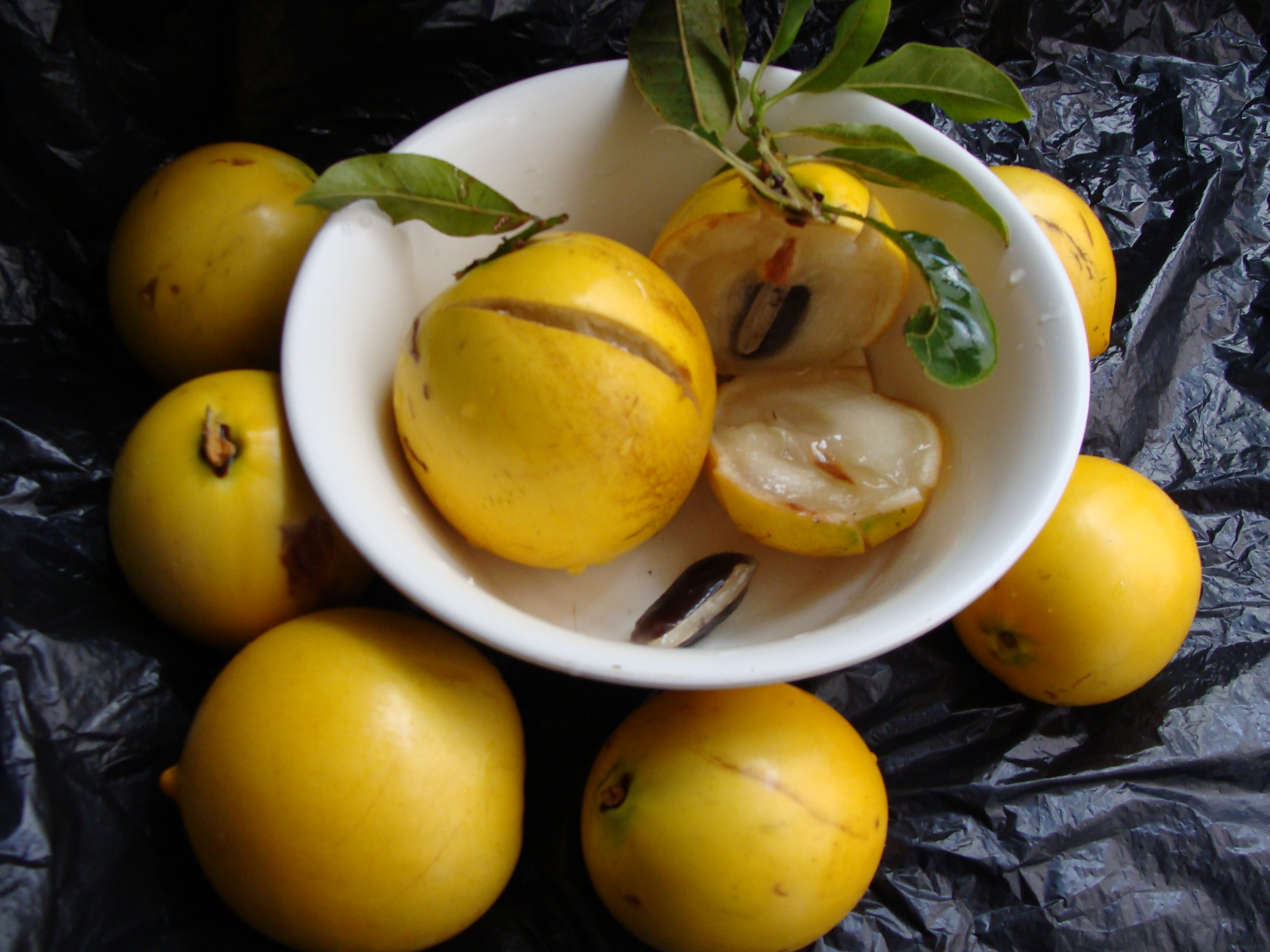 Category:Pouteria caimito - or Abiu fruit. fruta do Abieiro